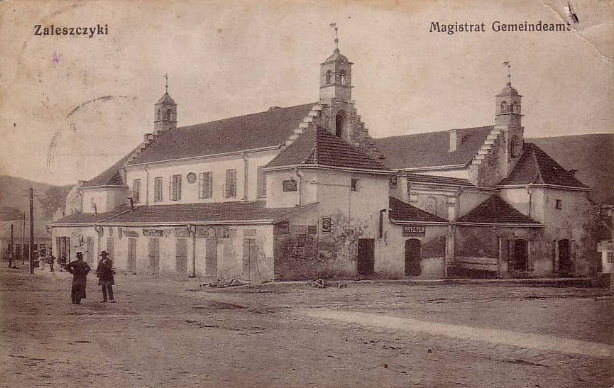 Ратуша в Заліщиках. Поштівка.